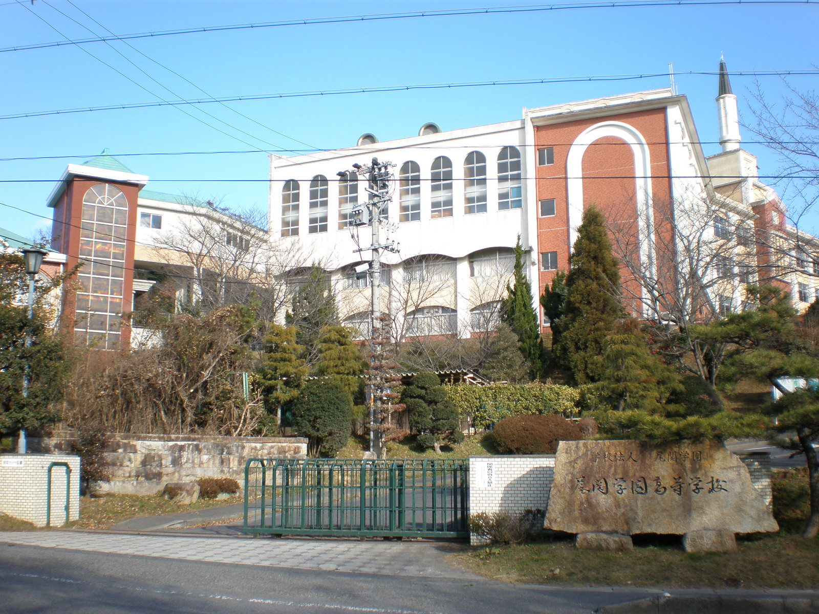 愛知県小牧市にある尾関学園高等学校